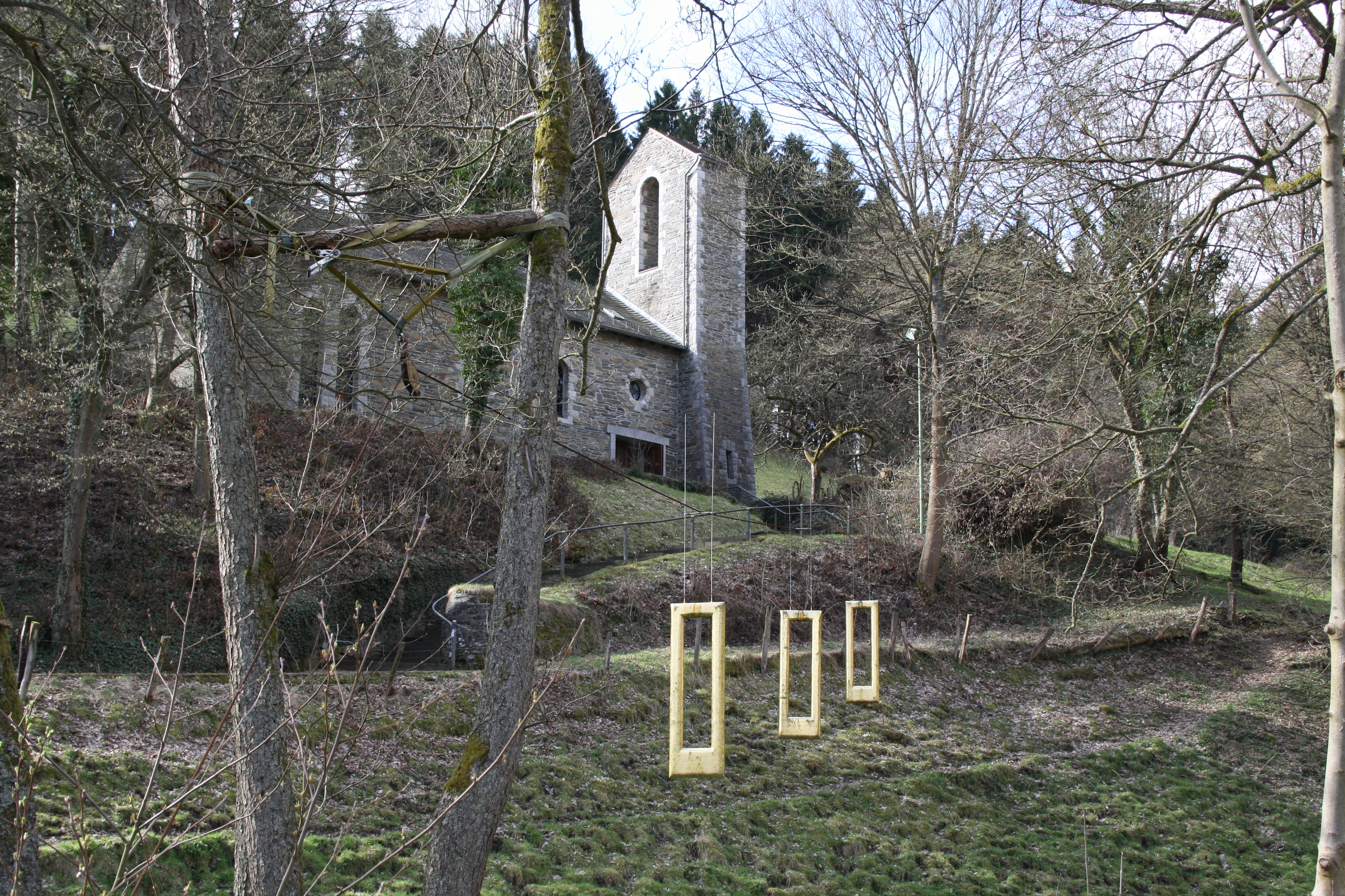 Marienkapelle in Hürtgenwald-Simonskall (Deutschland)